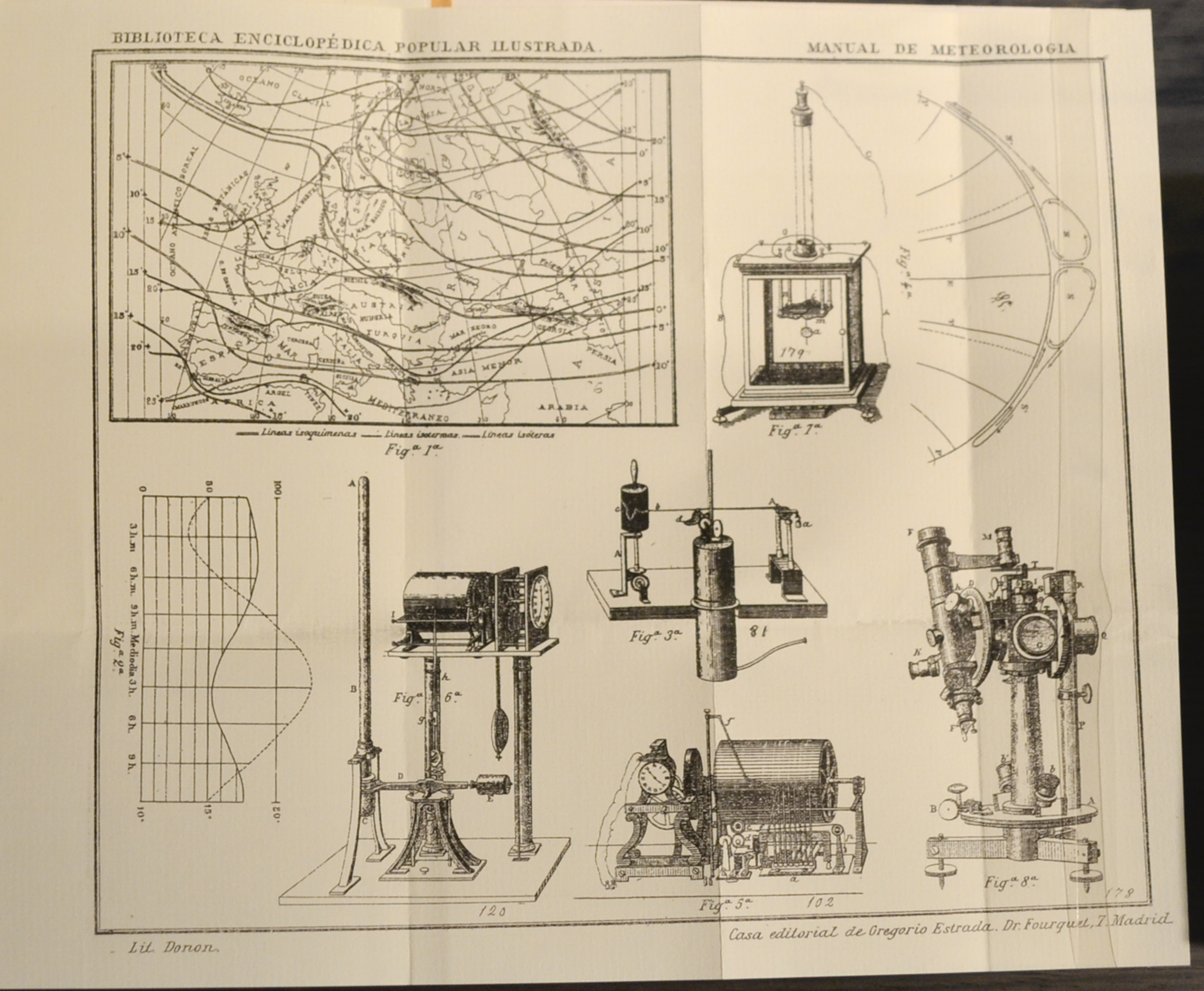 Gumersindo Vicuña. Manual de metereología popular. Reproducción facsímil de la edición de Macrid de 1880. Instituto de Historia de la Medicina y de la Ciencia López Piñero.